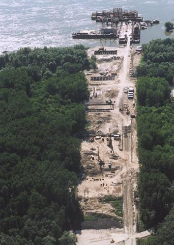 Dunaújváros, hungary, aerialphotography